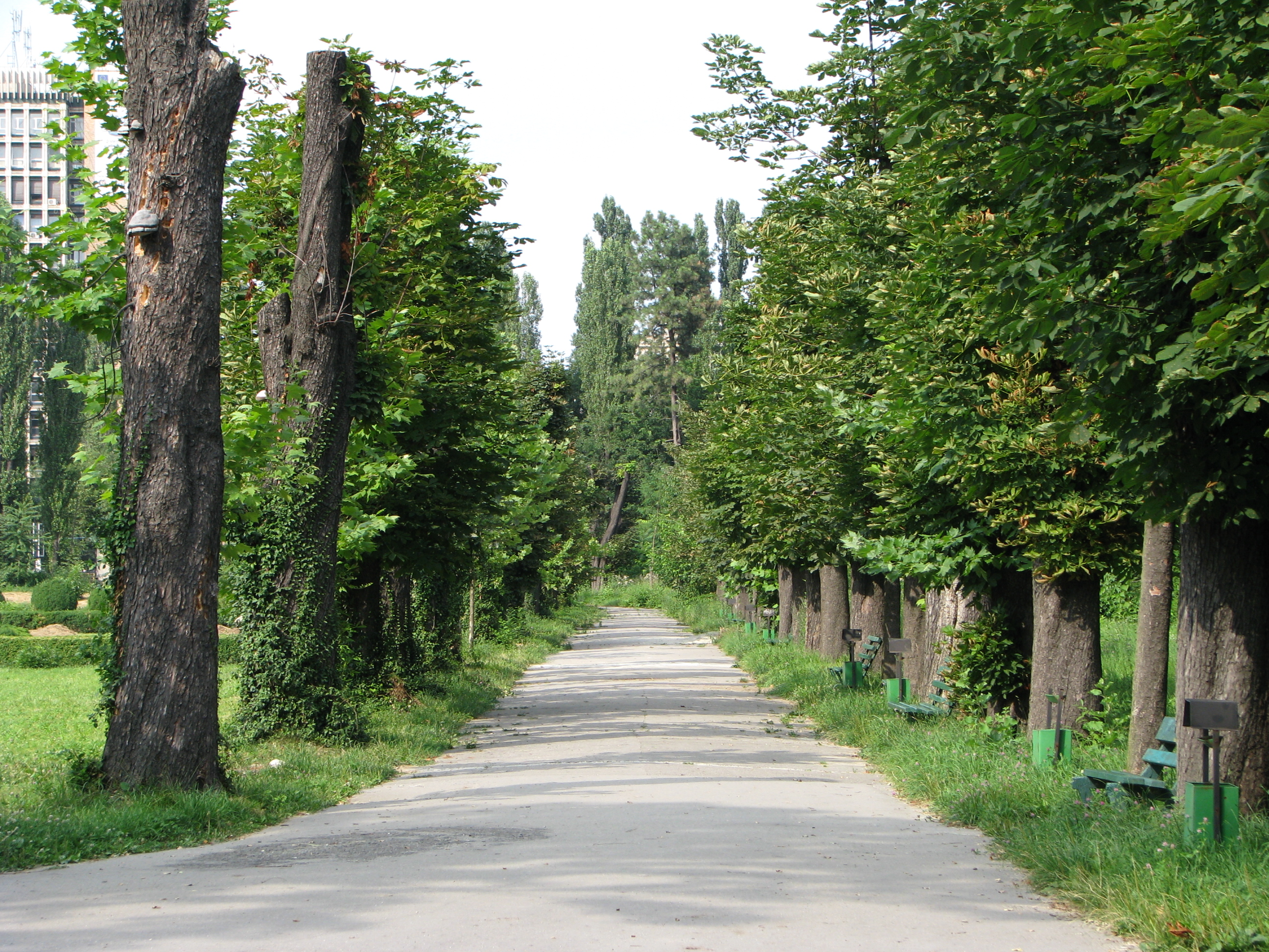 Grădina Botanică din București - aleea castanilor